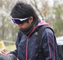 miyaguni_sign